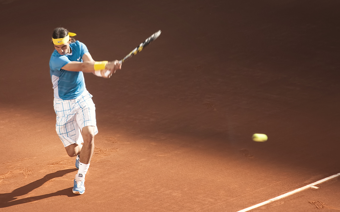 Rafael Nadal durante la final del toreno, en la que se impuso a Roger Federer, que defendía el título logrado en 2009.